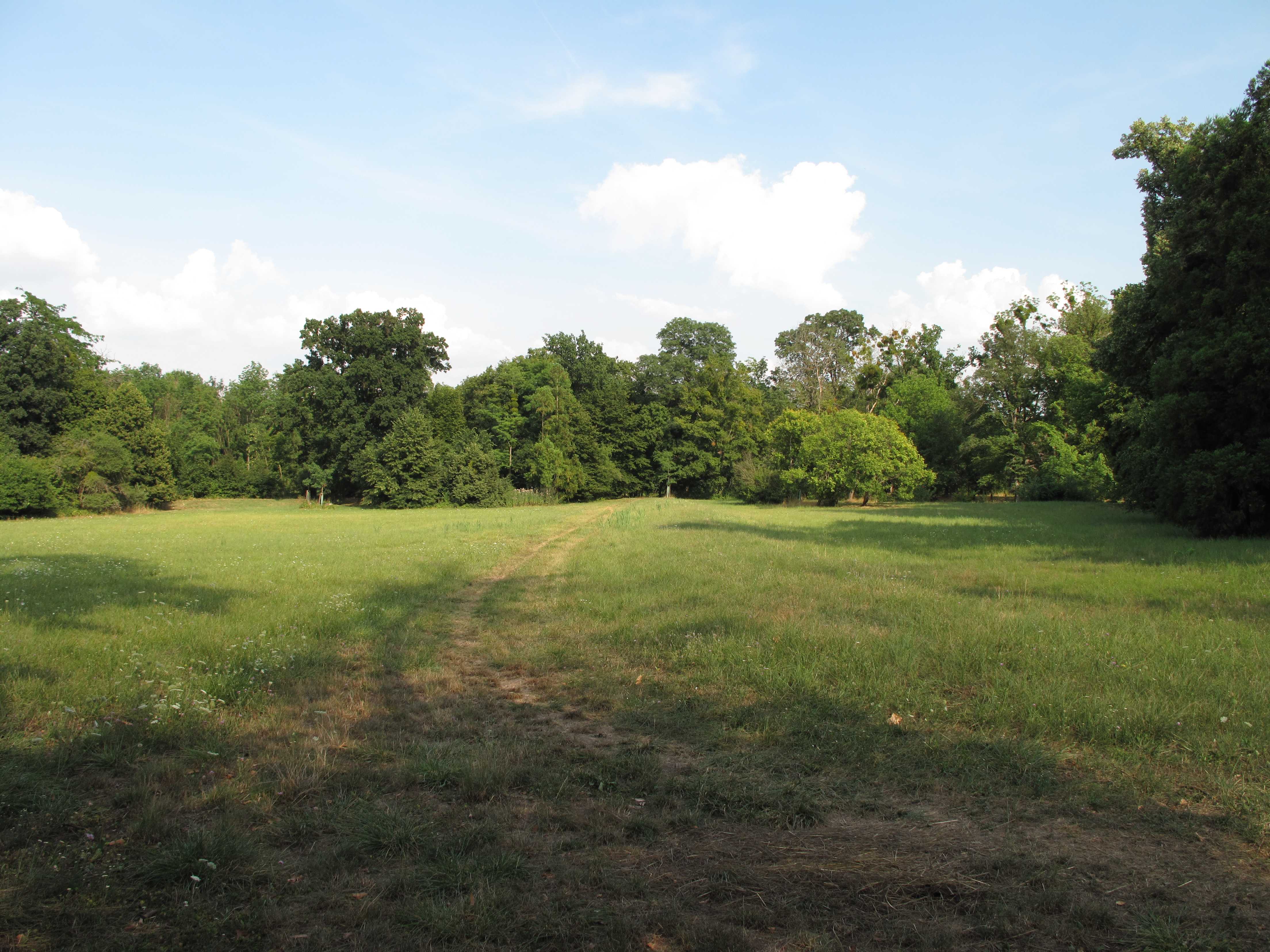 Přírodní park Niva Dyje. Okres Břeclav, Česká republika.